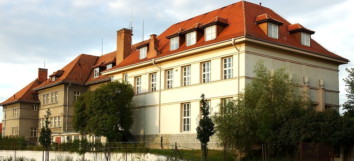 budova SVŠE Znojmo